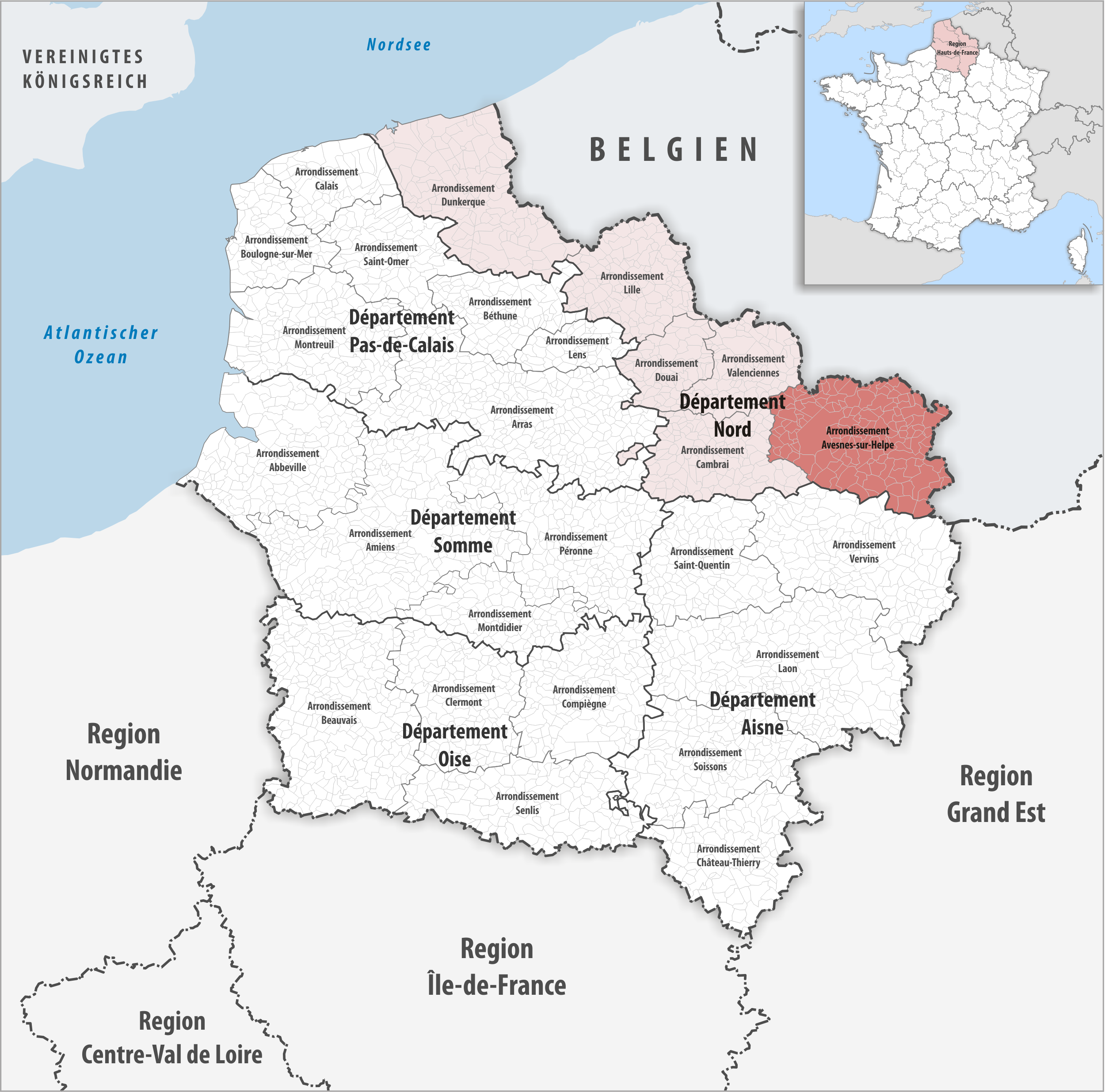 Lage des Arrondissements Avesnes-sur-Helpe